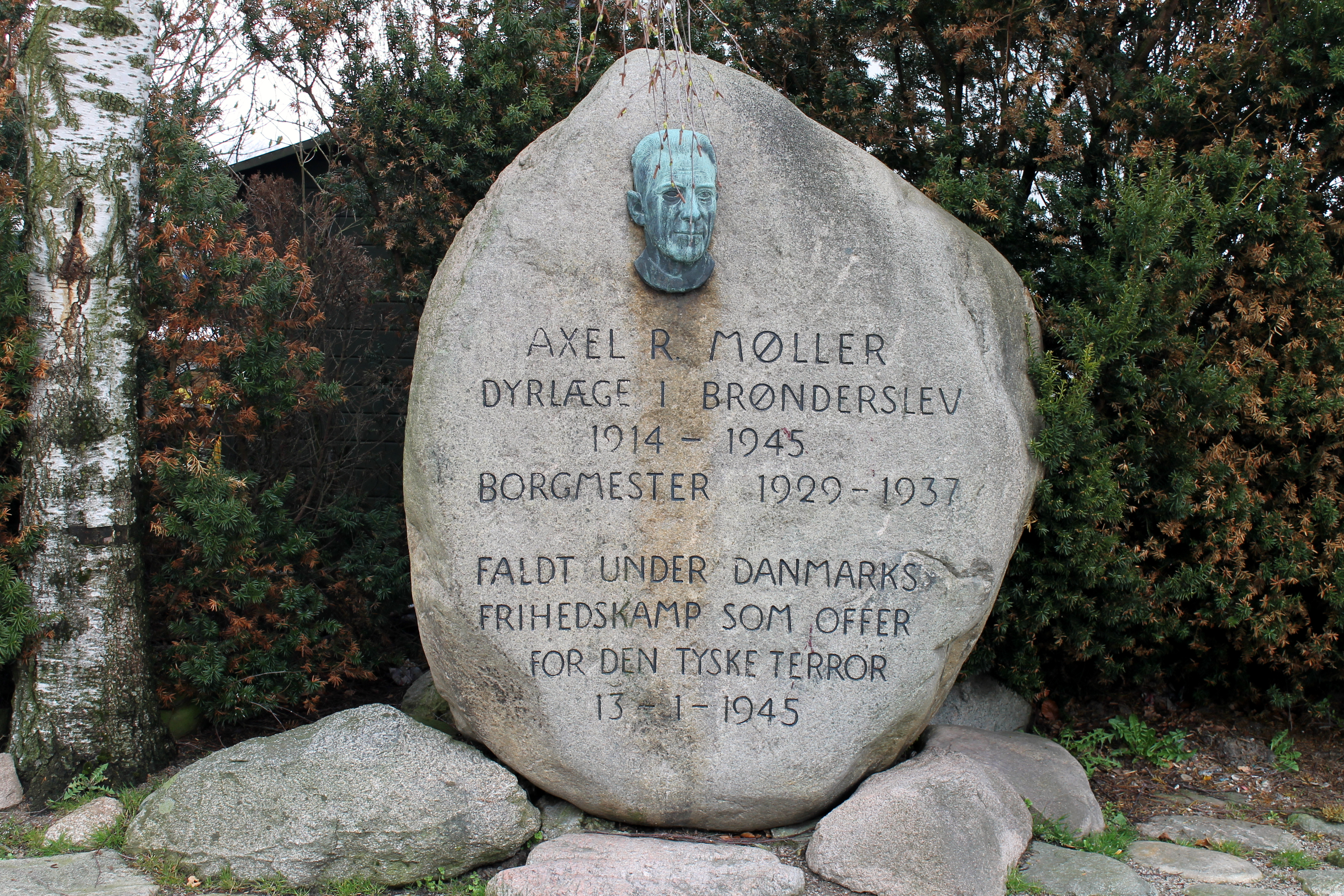 Axel R. Møller, Dyrlæge, Borgmester i Brønderslev, Faldt under Danmarks frihedskamp som offer for den tyske terror